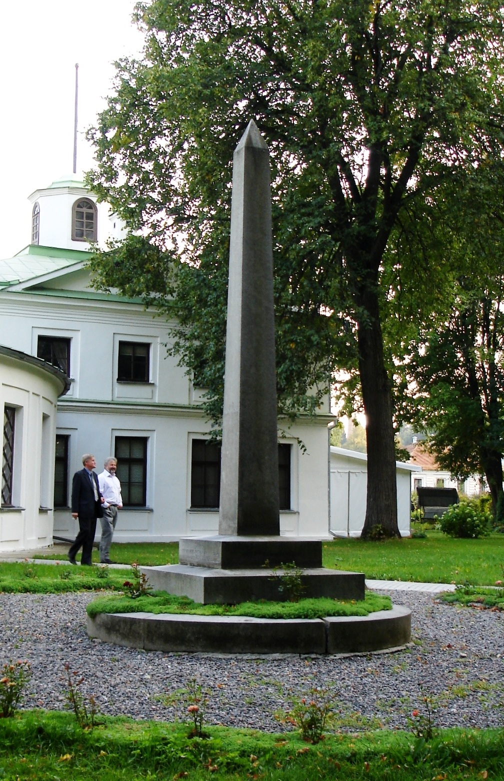 Обелиск в Середниково